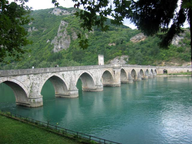 גשר העתיק על נהר דרינה בוישגראד - Old bridge on the River Drina in Visegrad